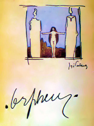 Capa do nº1 da revista Orpheu